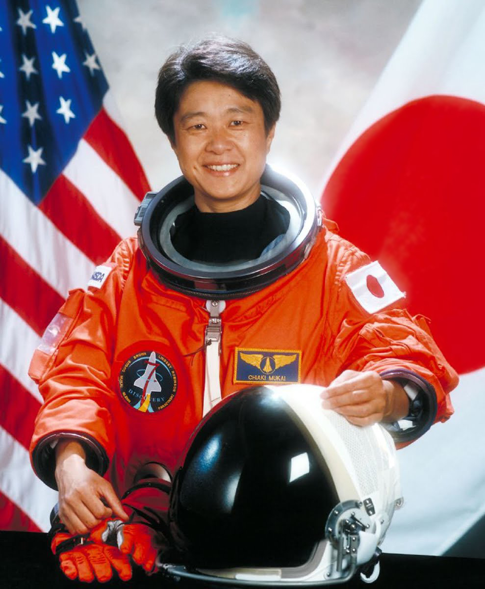 portrait astronaut Chiaki Mukai